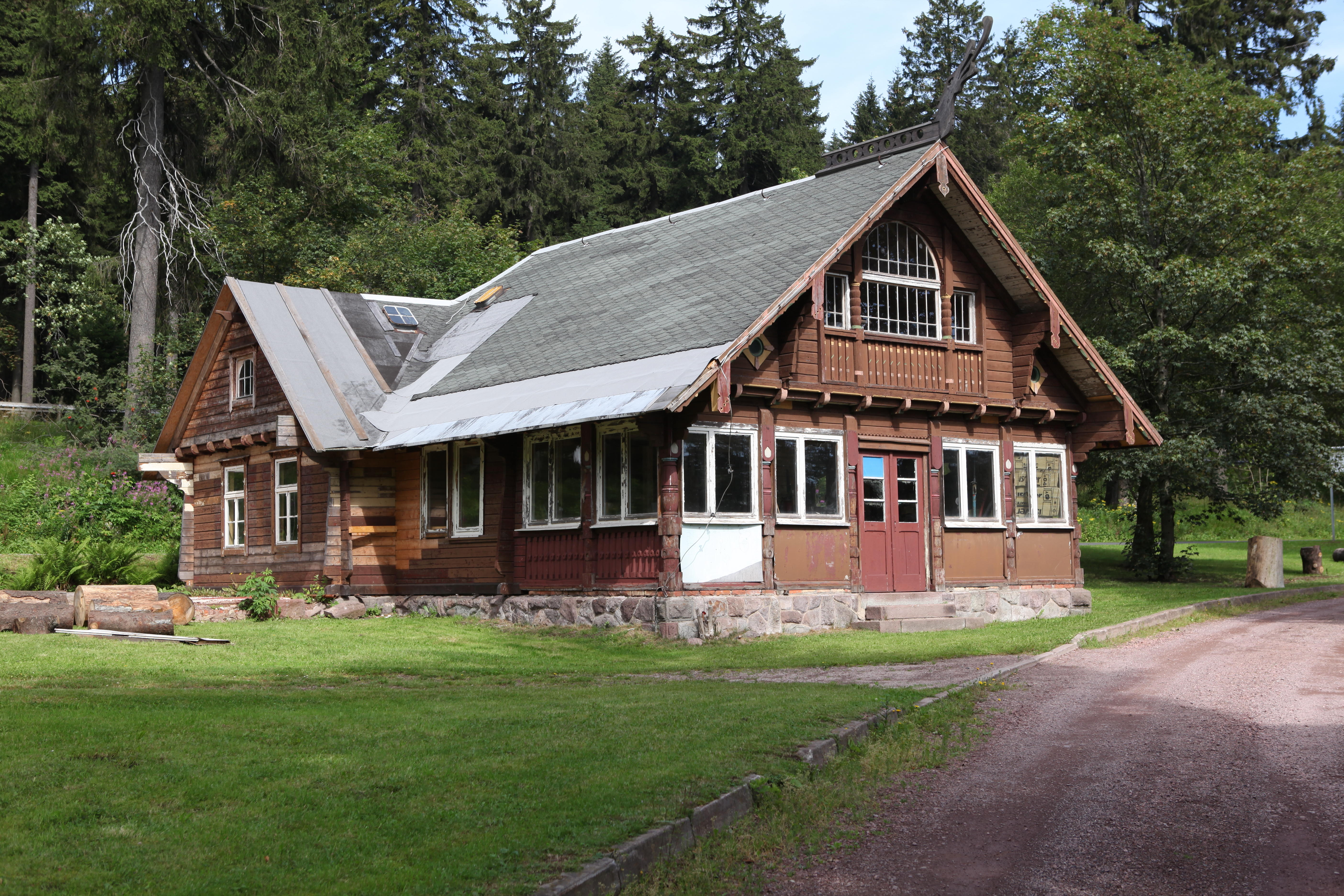 Ehemaliges Golfclubhaus von 1908 in Oberhof